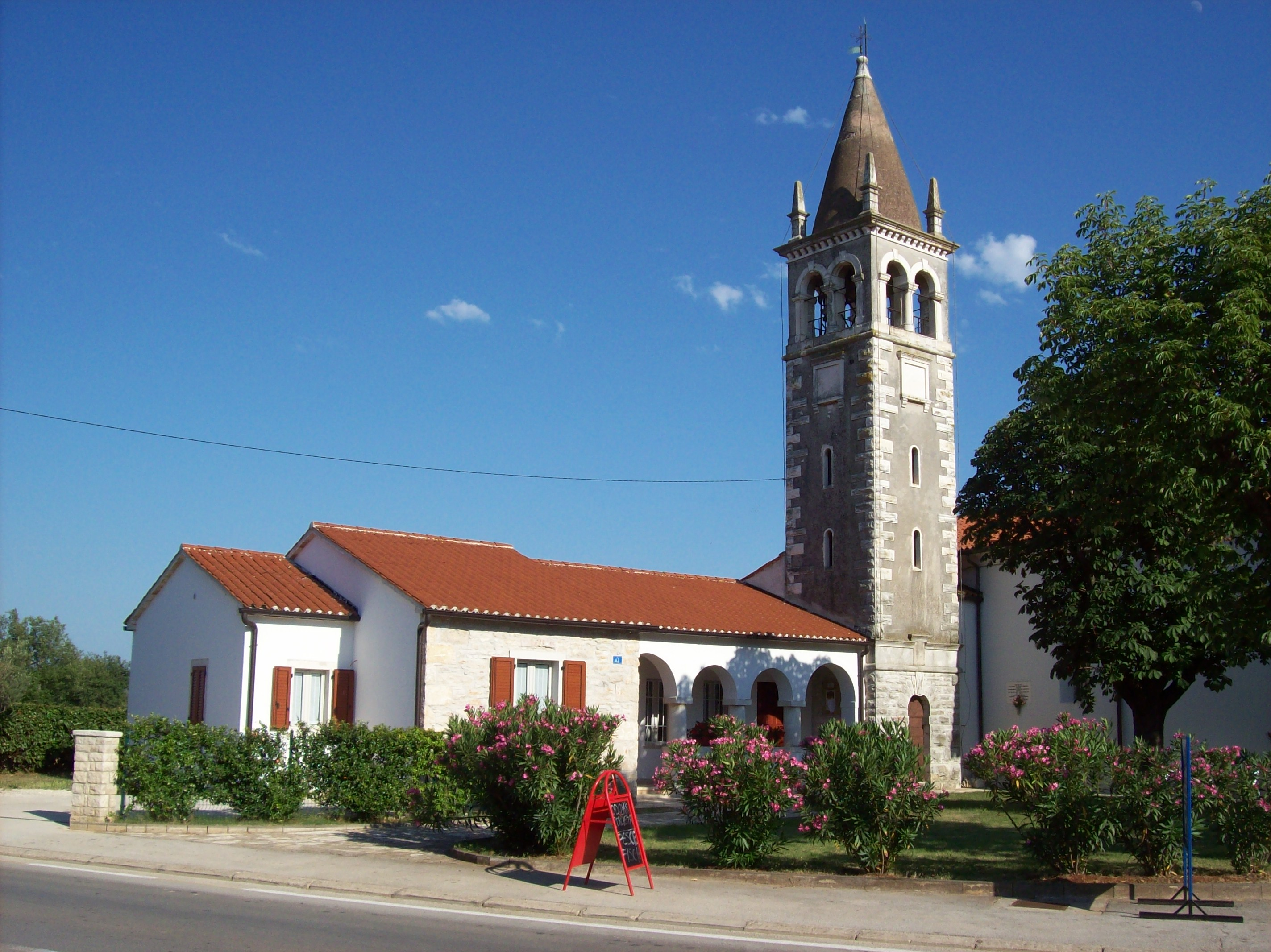 Marija na Krasu - Madonna del Carso, Croatia (church)